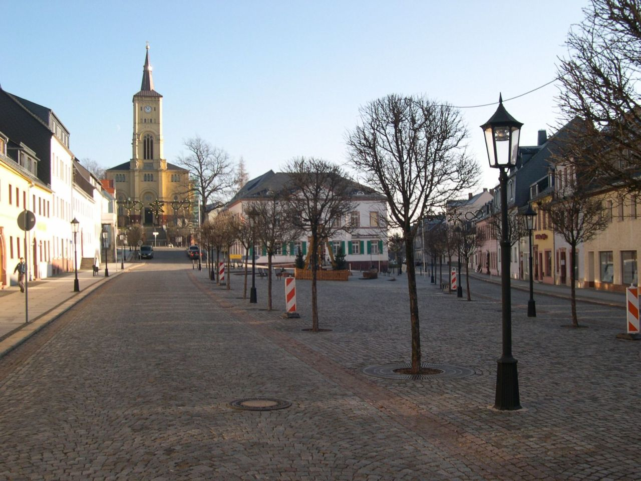 Markt von Hartha (Kreis Döbeln) im Dezember